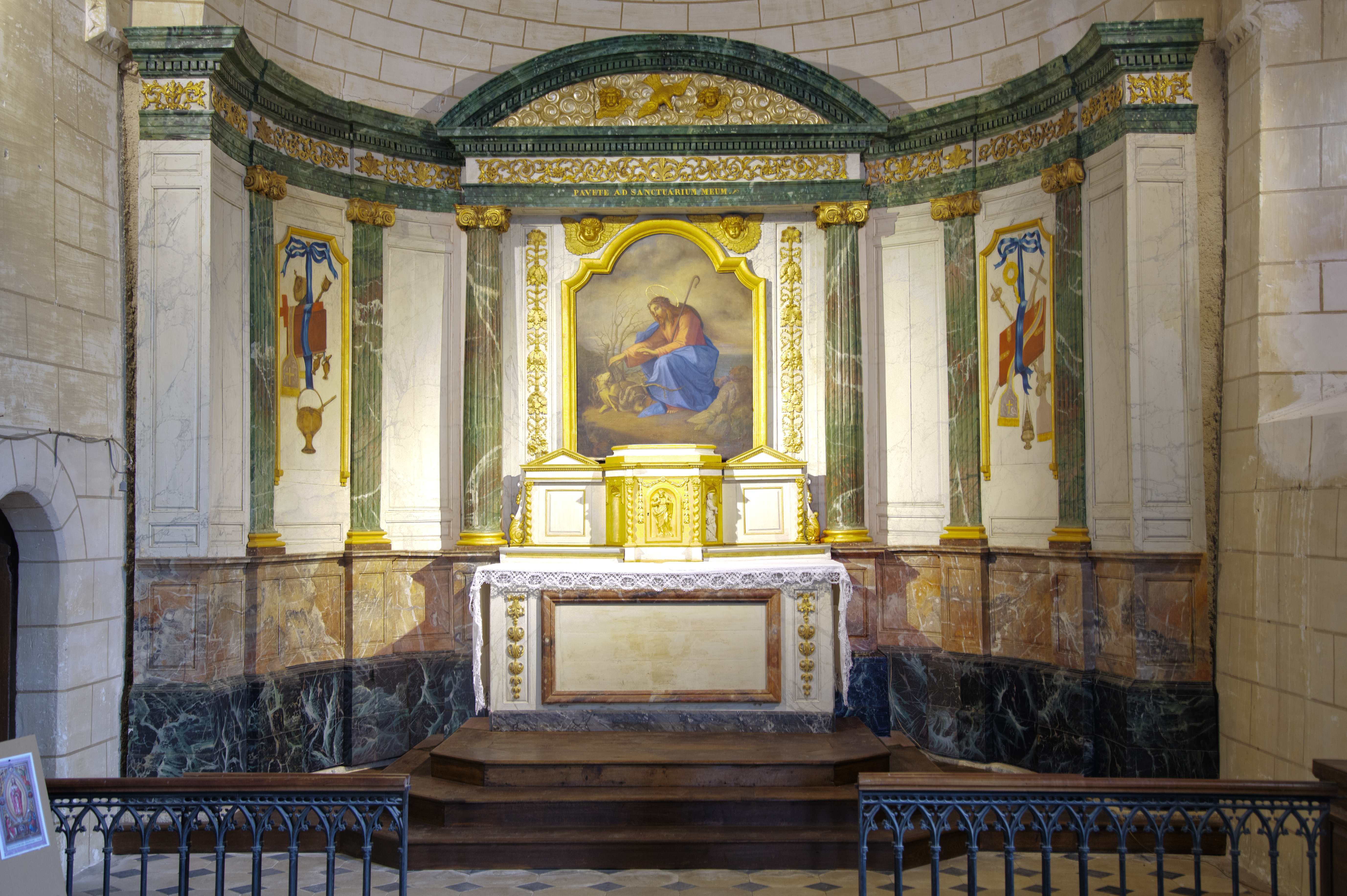 Retable de l'église de la Madeleine de Moisy (Loir-et-Cher, France) .